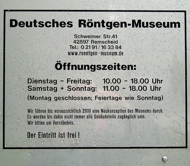 Deutsches Röntgenmuseum / German X-ray museum